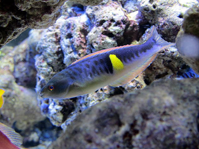 Pseudocoris bleekeri